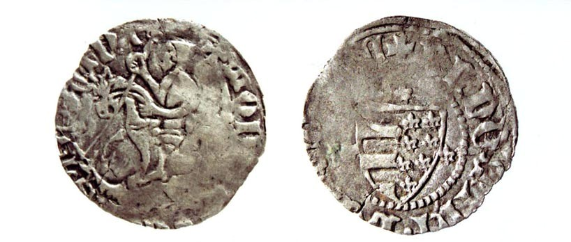 Подольский полугрошик Константина (Коригайло) Кориатовича князя Чарторыйского (Диаметр: 17,5 - 18,5 мм, вес: 0,8 г - 1,2 г.)